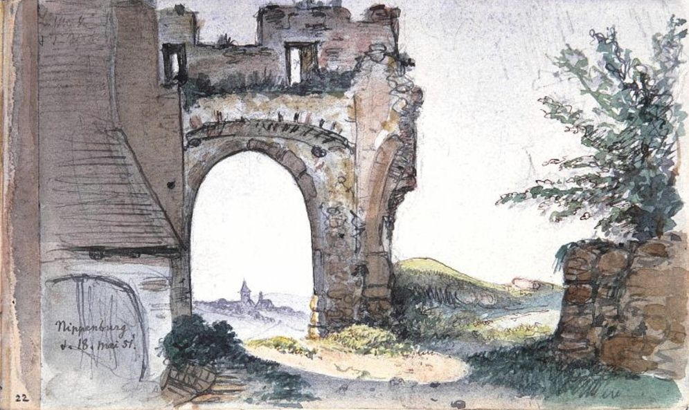 Nippenburg. Blick aus dem Innenhof auf Rest des Burgtores. (Aquarell)